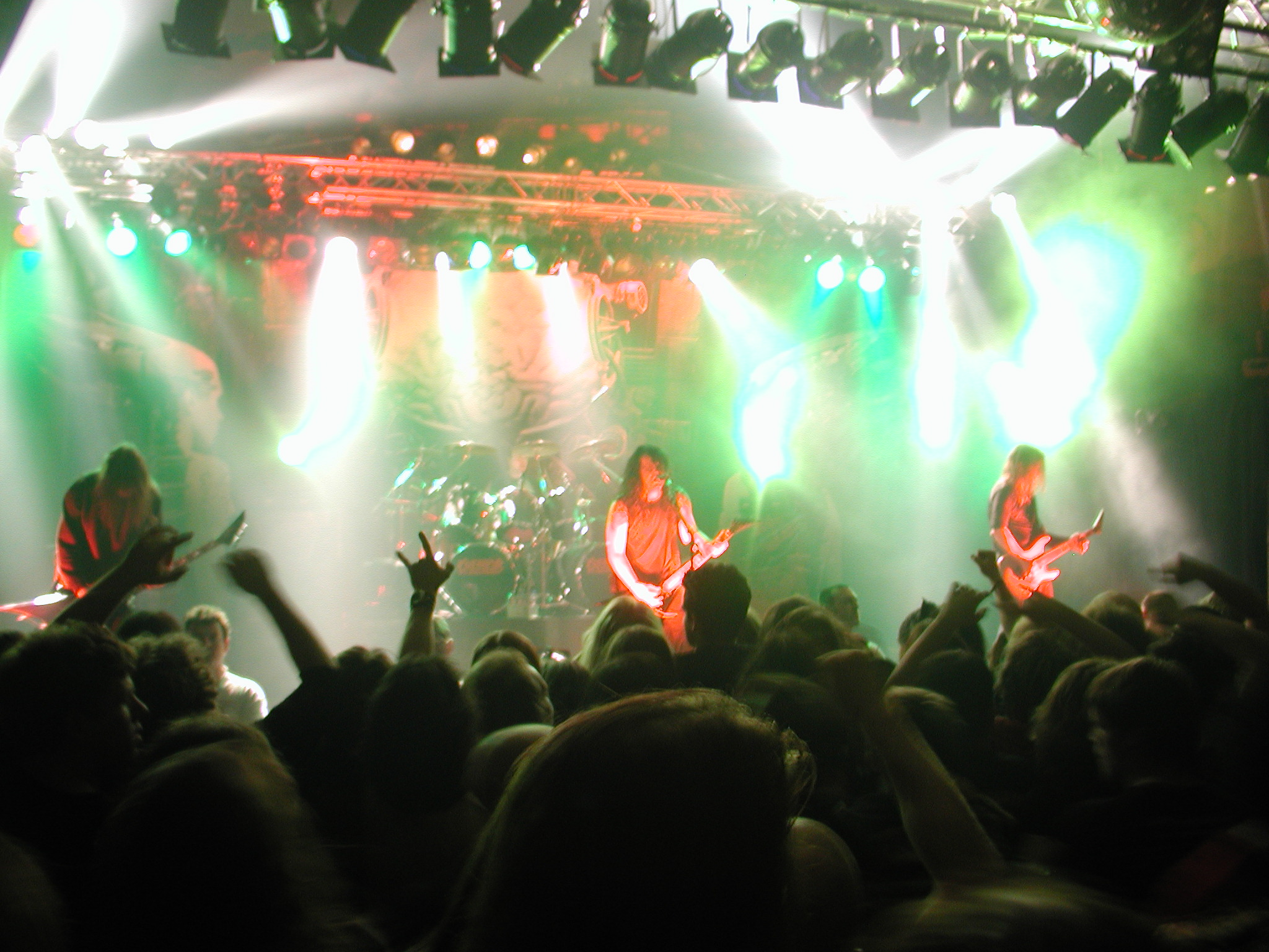 Kreator live, eigenes bild